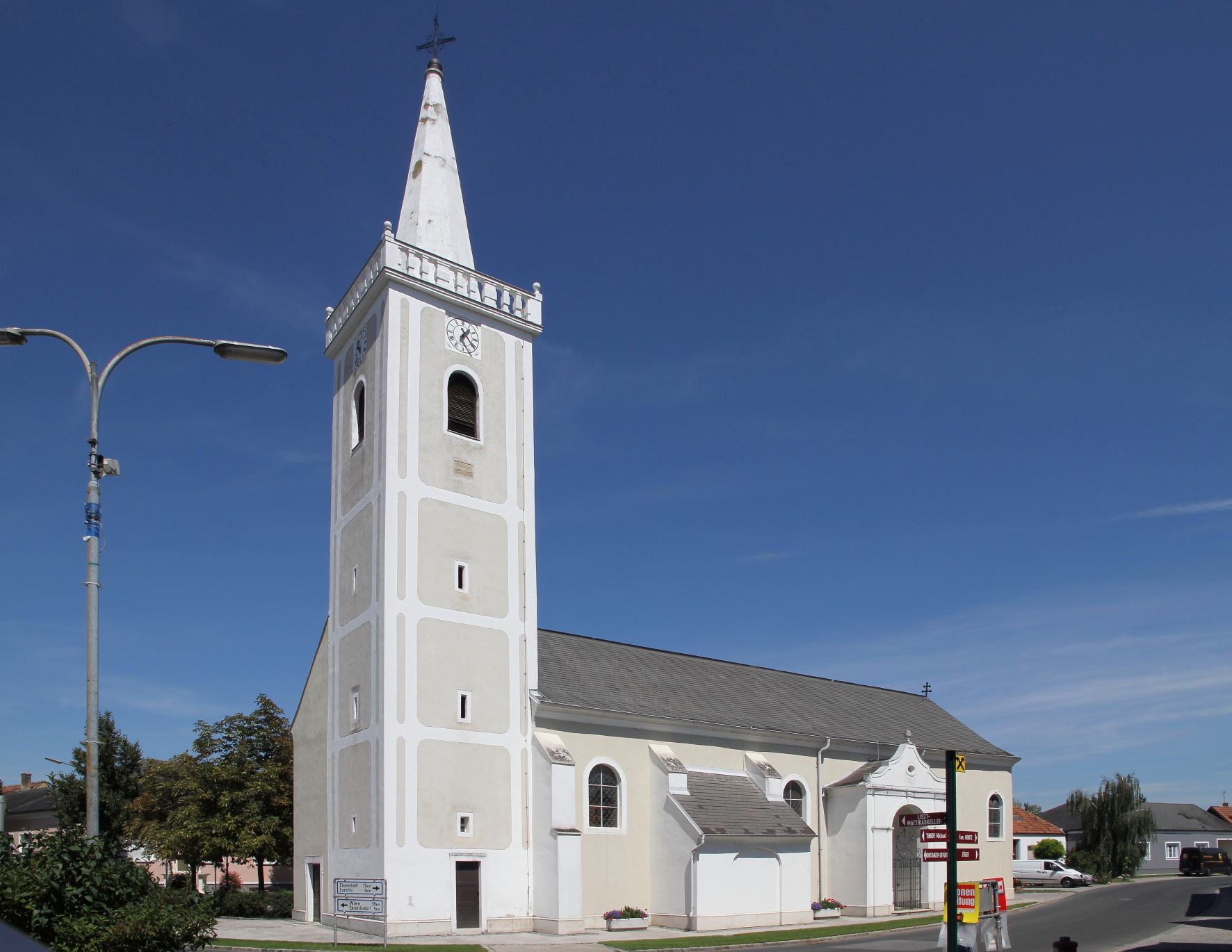 Die kath. Pfarrkirche hl. Maria Magdalena in der burgenländischen Gemeinde Leithaprodersdorf.